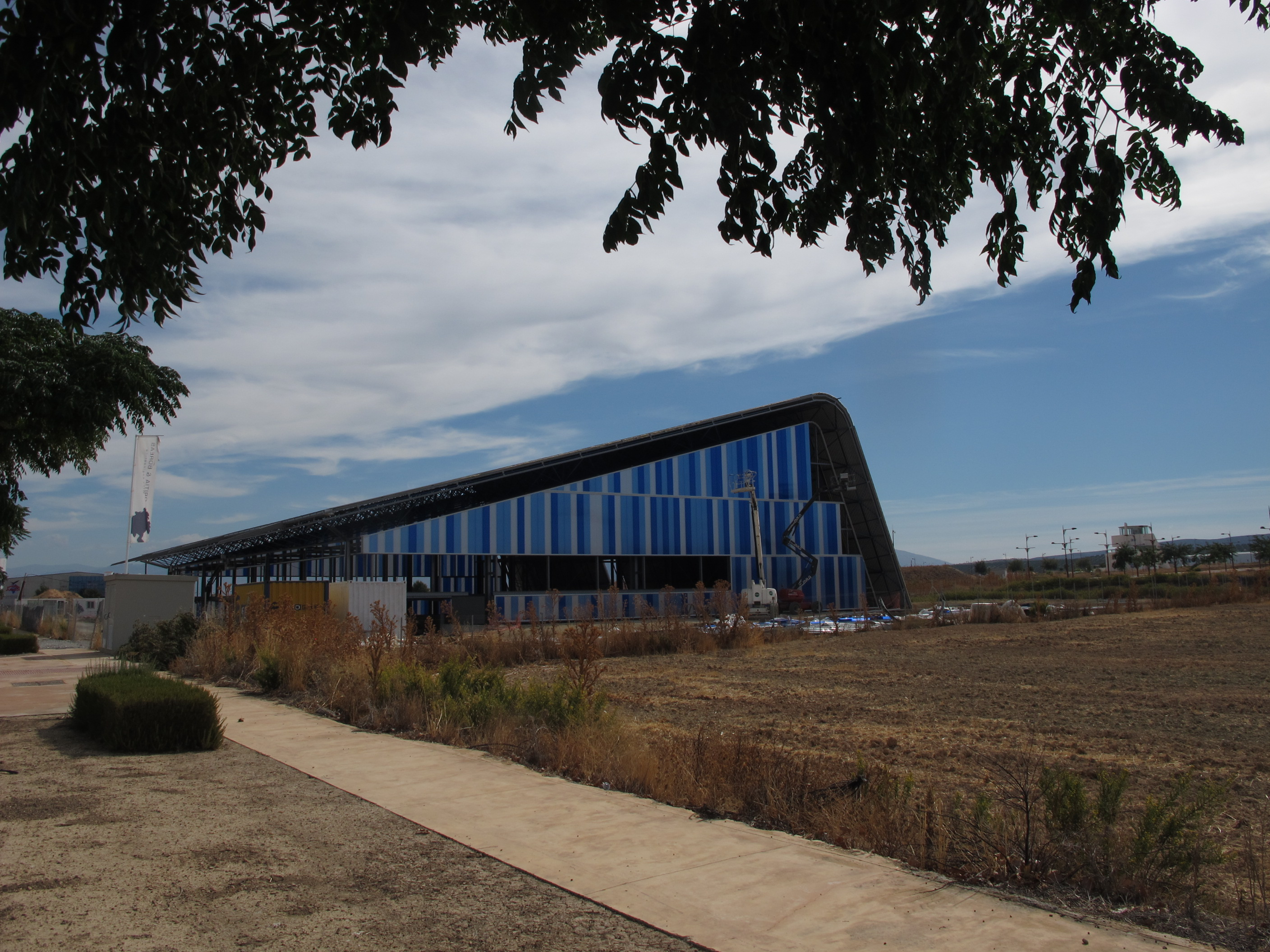 Nave industrial en el polígono semi-abandonado de Escúzar